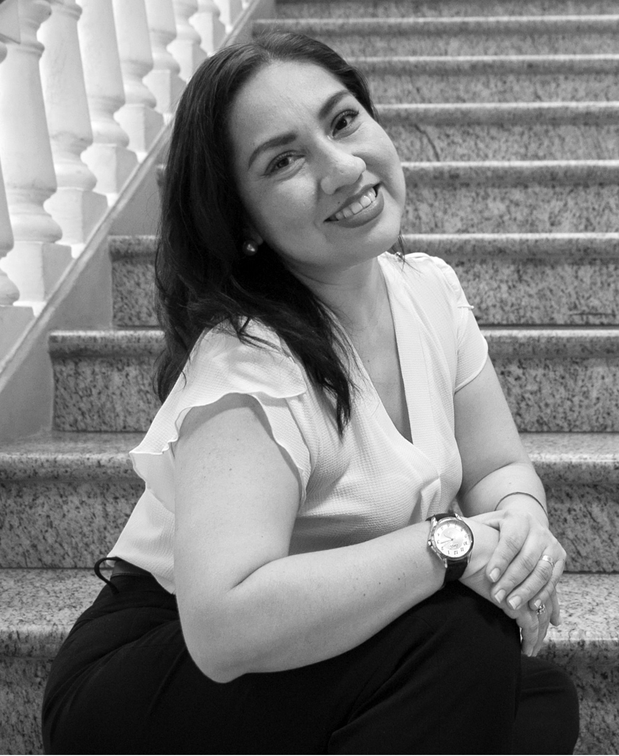 Solange Rodriguez Pappe en 2018